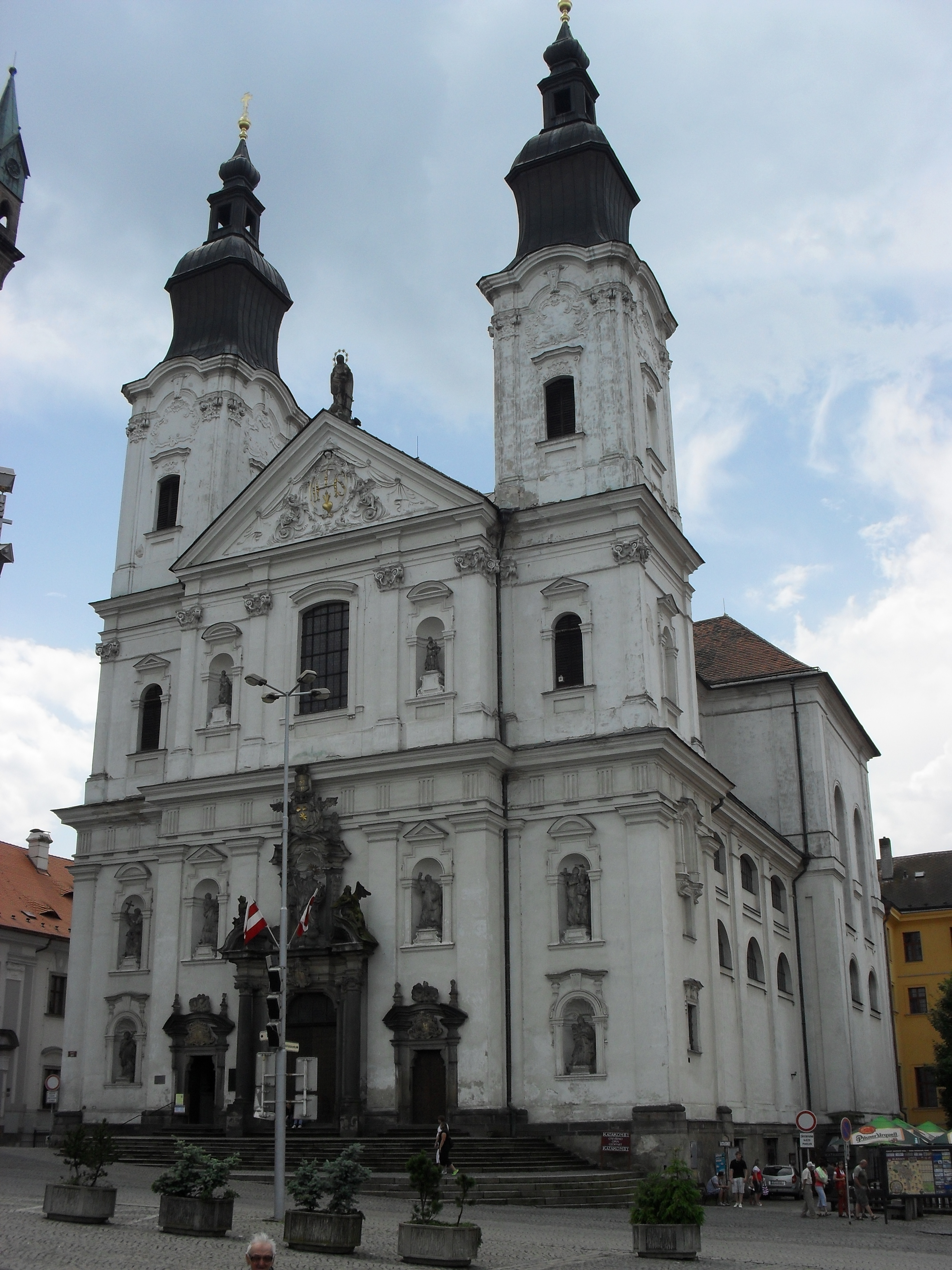 Barokní kostel na náměstí